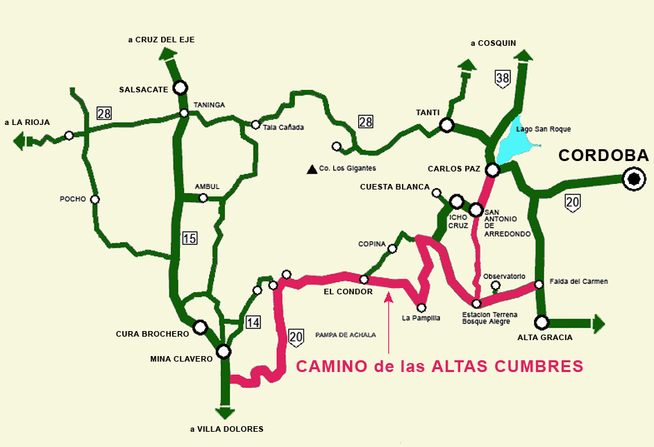 Esquema del Camino de las Altas Cumbres en la provincia de Córdoba, Argentina.